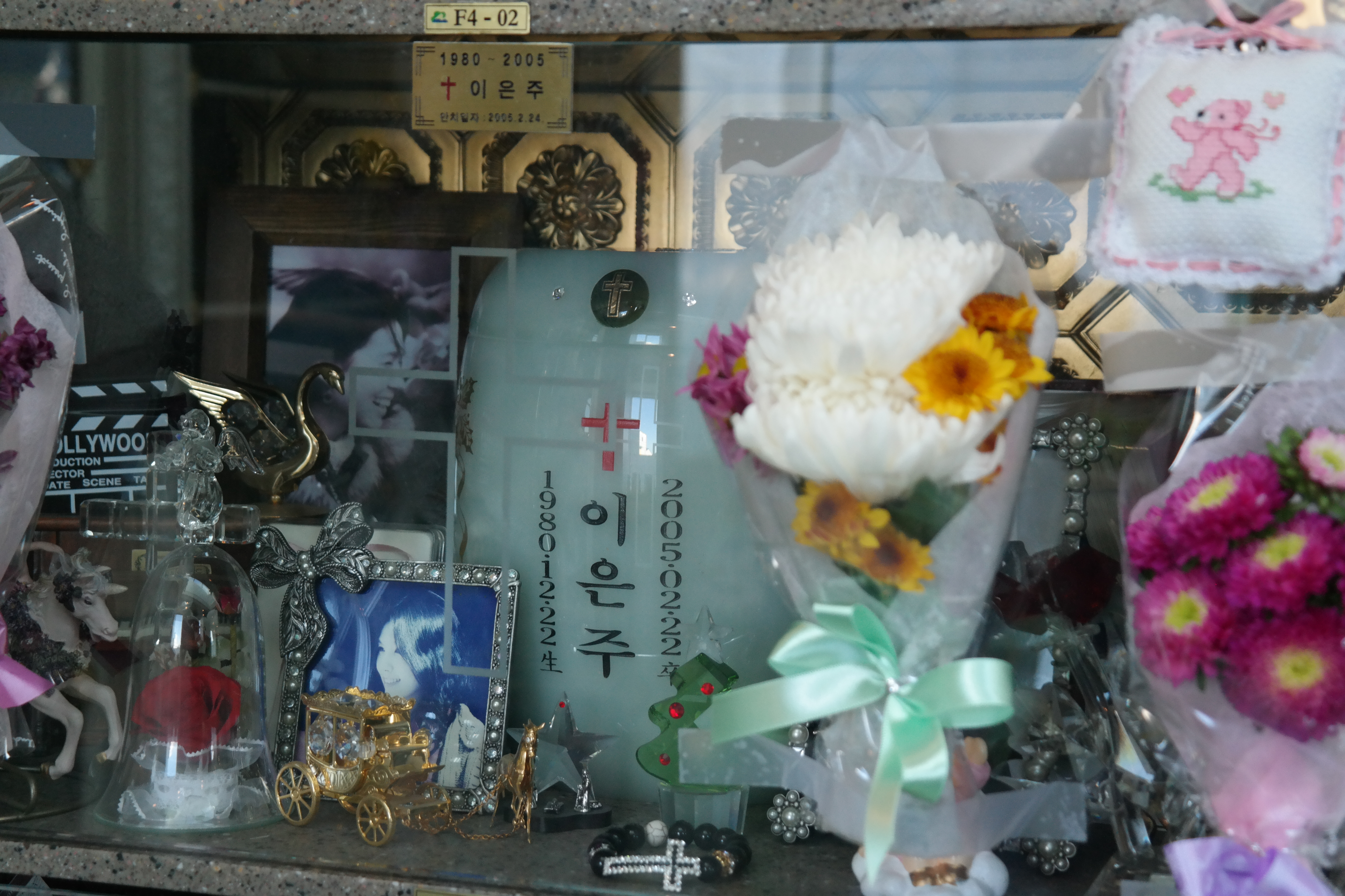 경기도 고양시에 위치한 자유로청아공원(청아공원) 기독교전용관에 안치된 대한민국의 배우 이은주의 유골함.